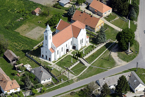 Légi fotó Kónyról